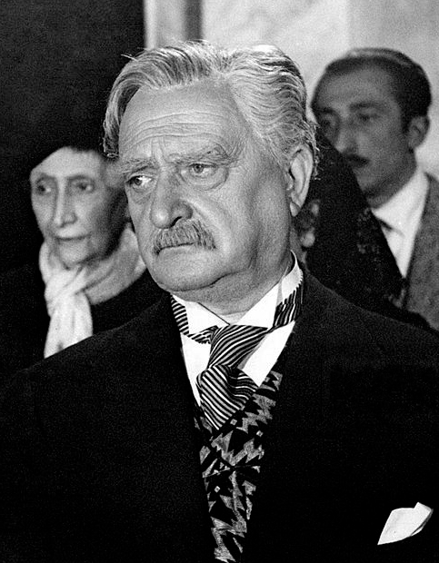 Gilberto Govi in Che tempi!